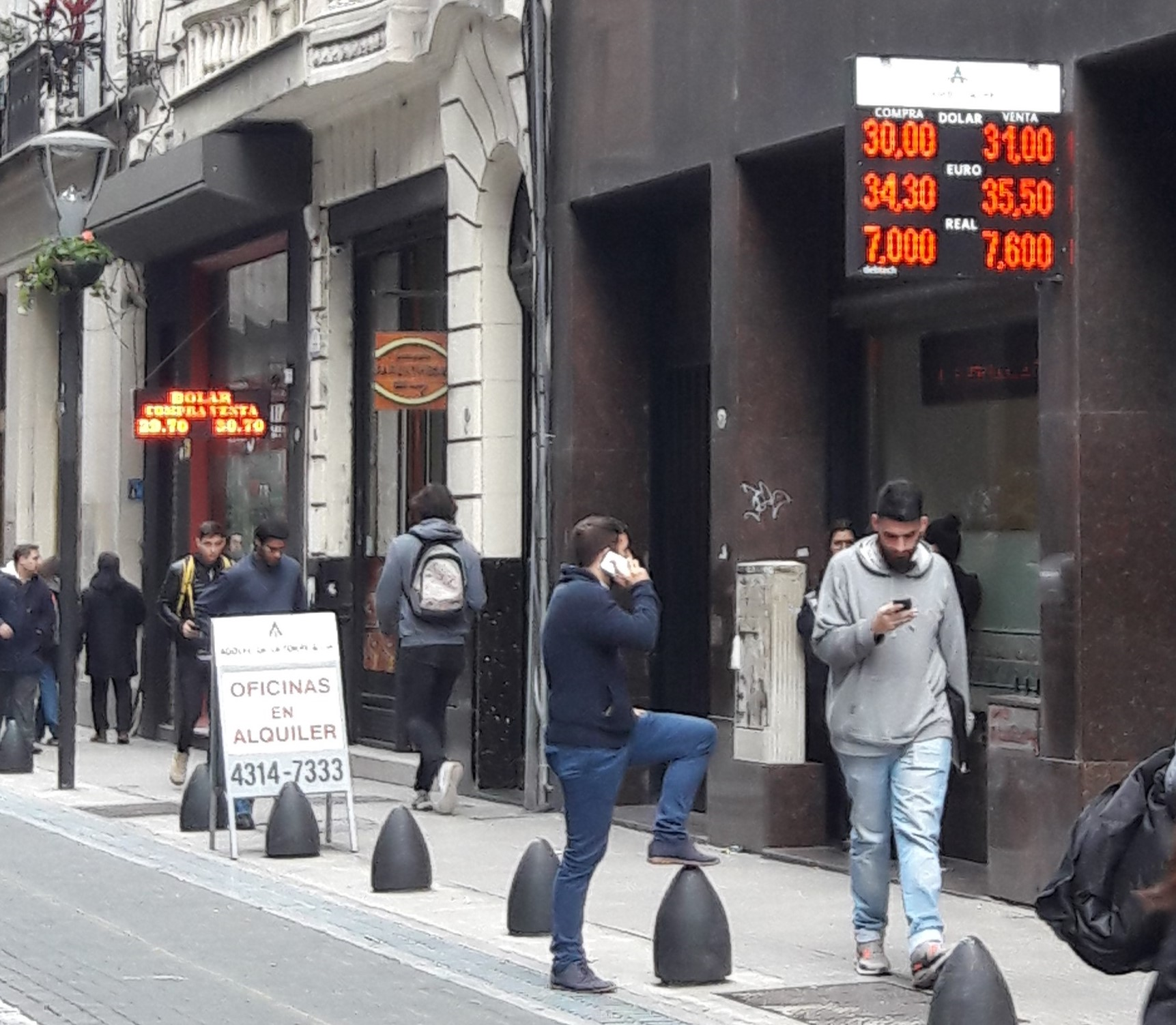 El precio de dólar minorista (USD) para la venta en casas de cambio de la ciudad de Buenos Aires superó por primera vez los 30 ARS el día 13 de agosto de 2018, acercándose incluso a los 31 ARS. Casas de cambio con el precio del dólar, en la calle Sarmiento, San Nicolás, CABA.